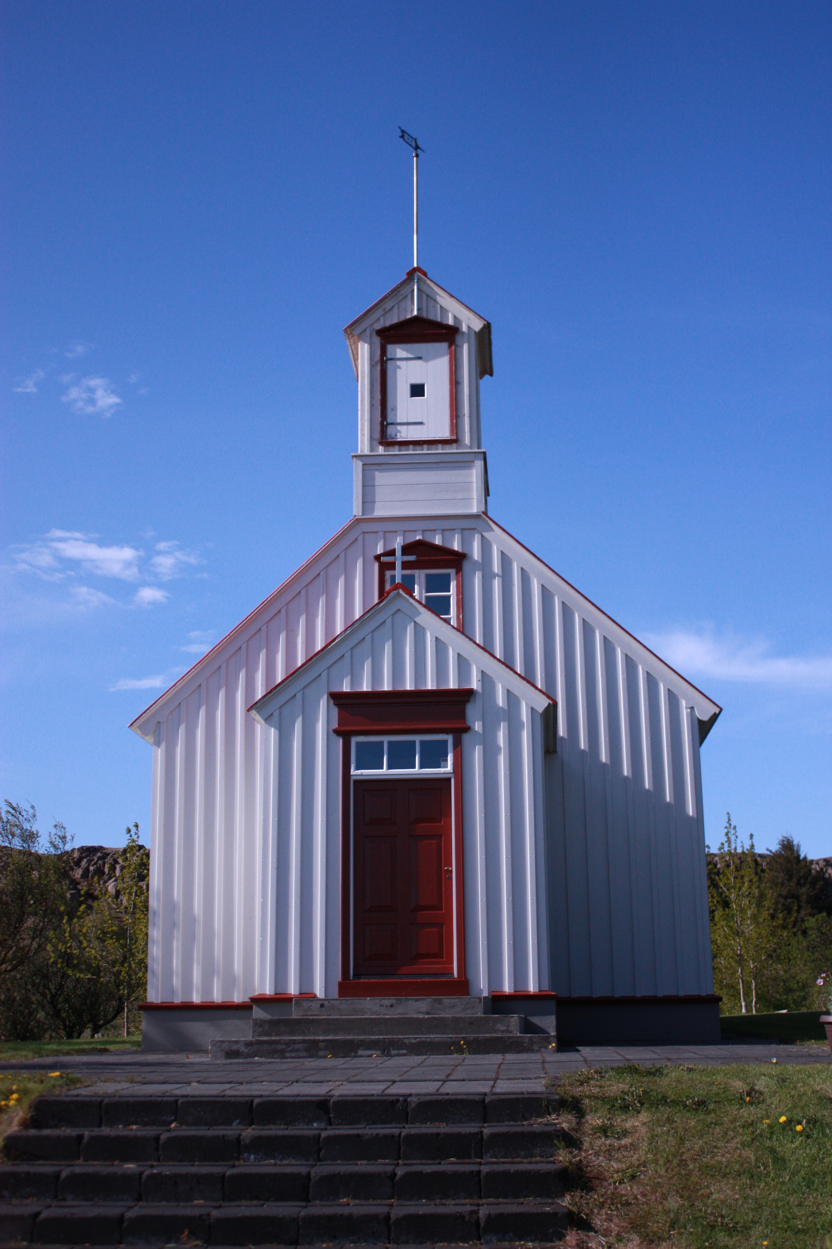 Kirche in Borg á Mýrum einem Weiler von Borgarnes, Island.